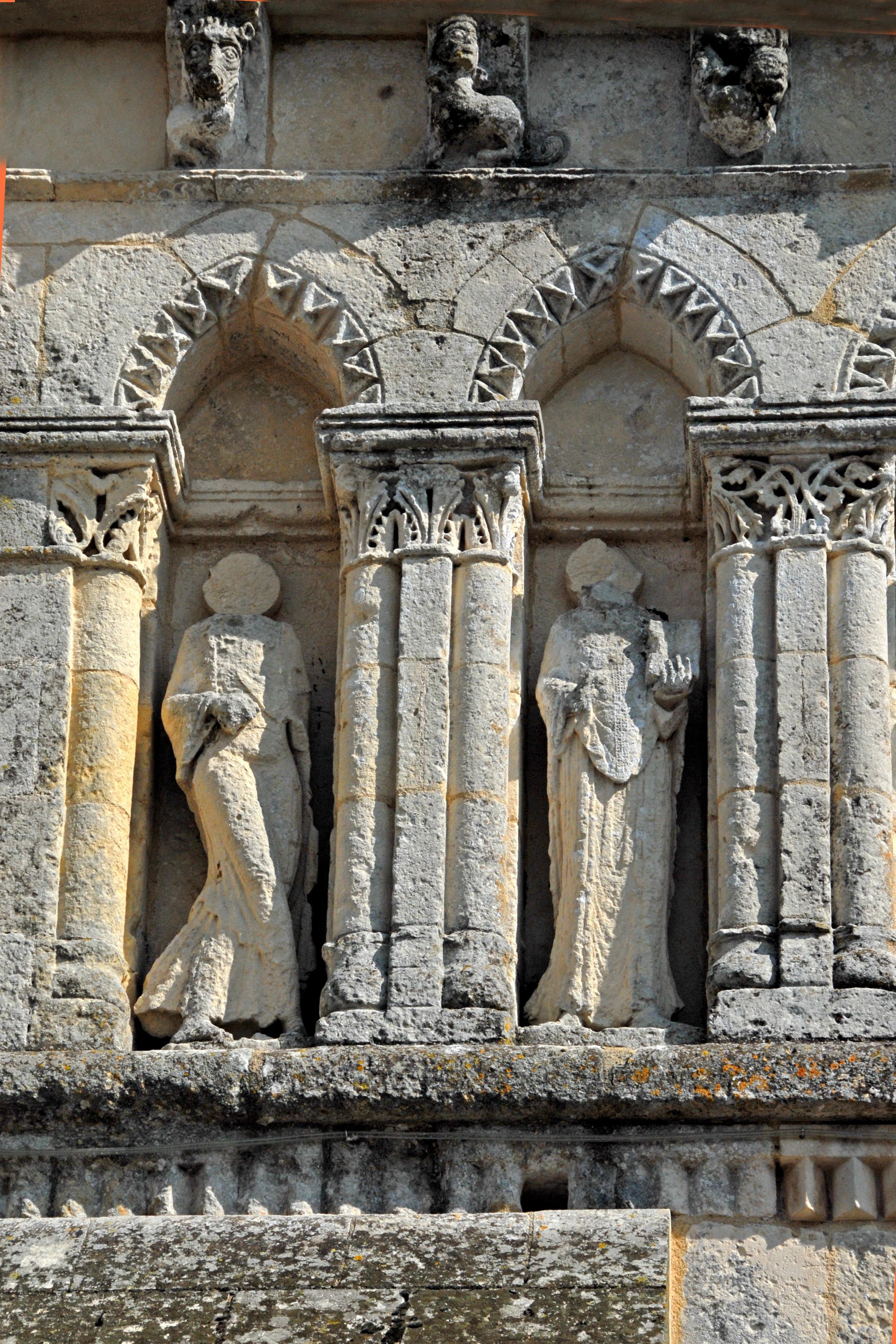 Pfarrkirche Saint-Pierre-de-Pérignac, Apostel